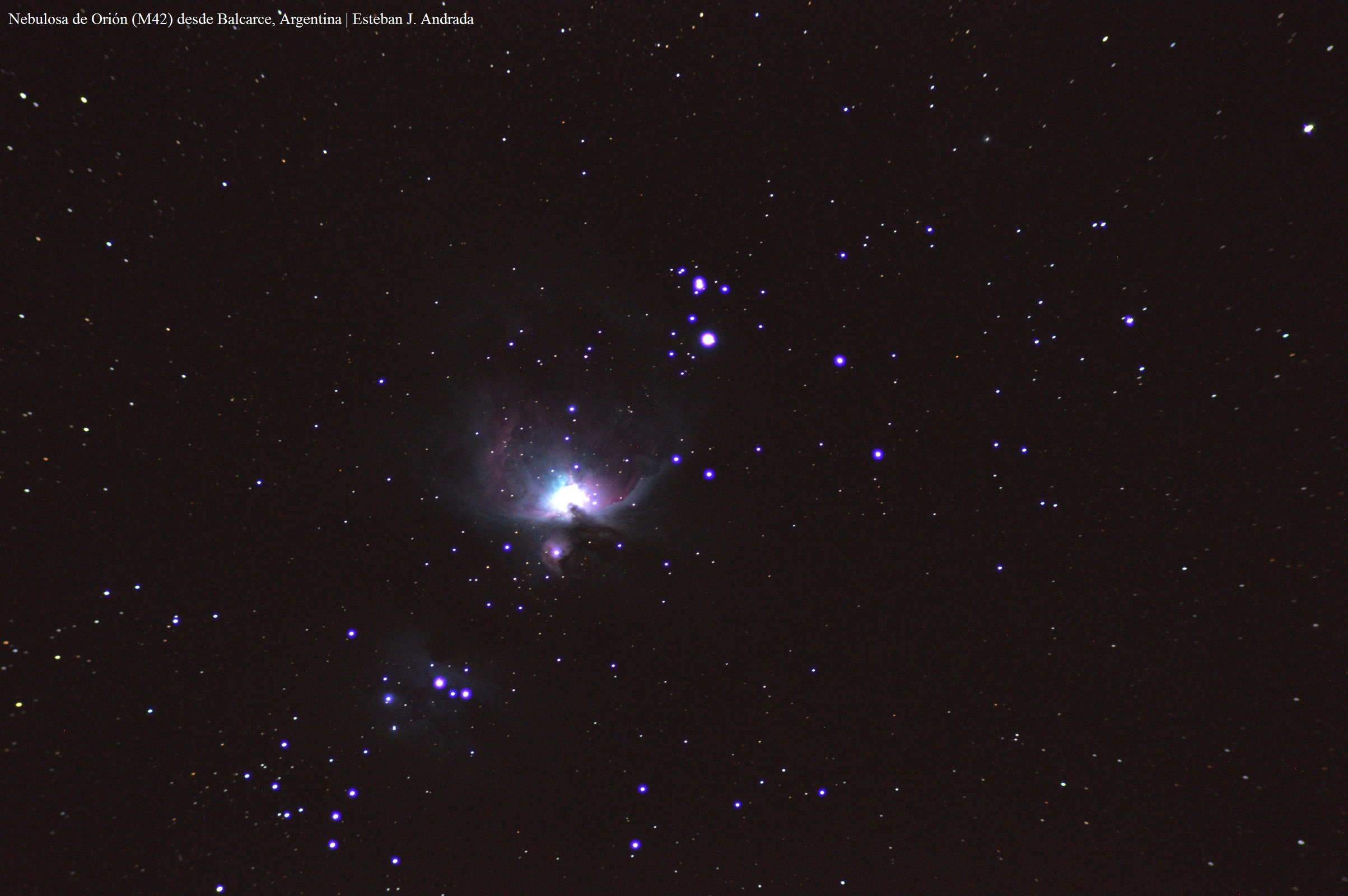 Nebulosa de Orión captada a través de un telescopio refractor de 80mm, desde cielos rurales en Balcarce, Argentina.